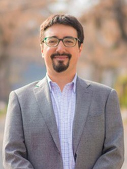 Juan Ignacio Latorre Riveros, psicólogo y político chileno